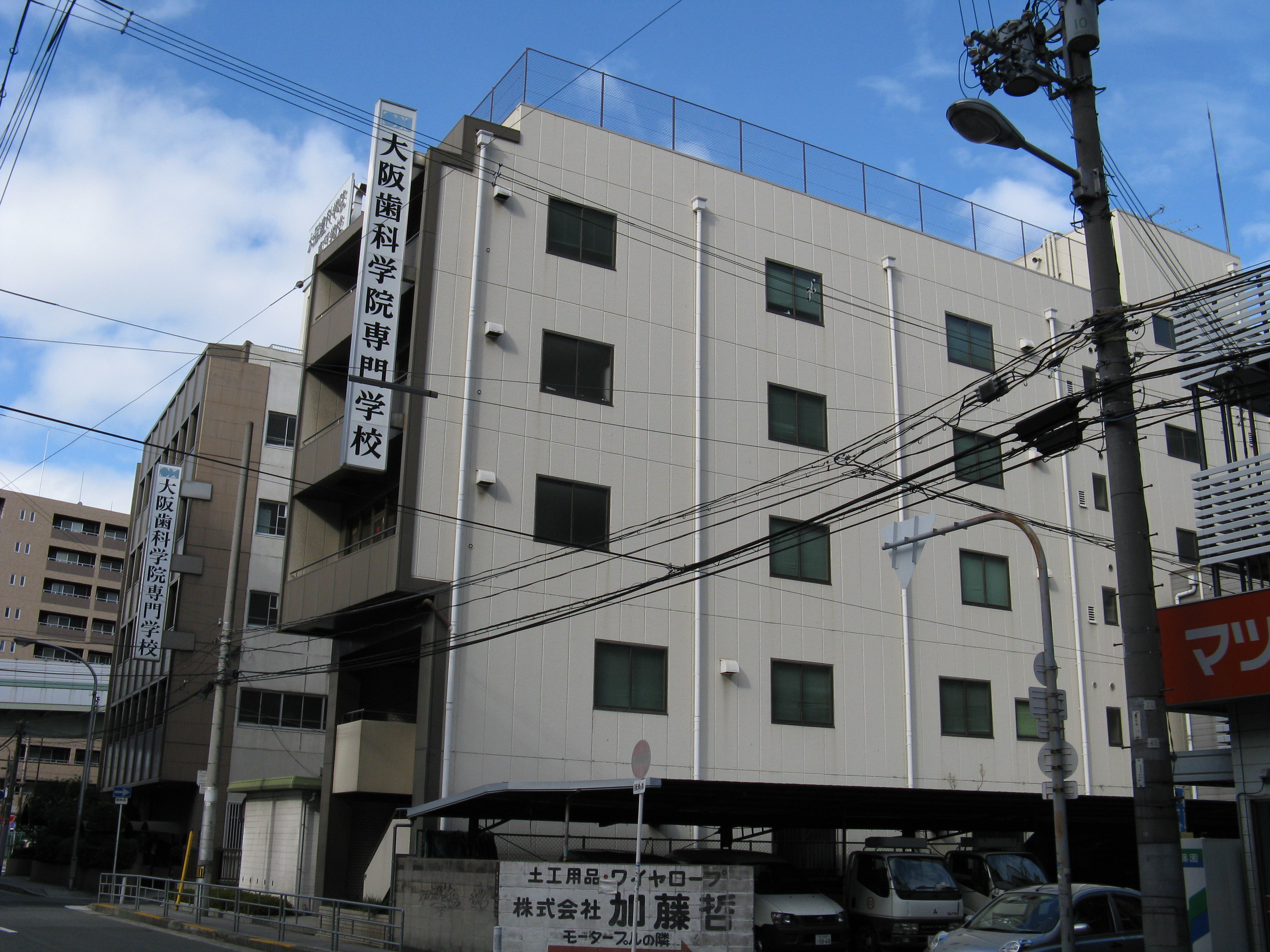 大阪歯科学院専門学校